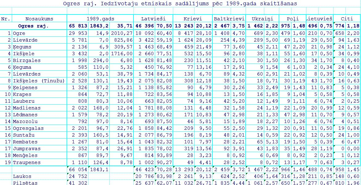 Этнический состав населения Латвии по переписи 1989 года